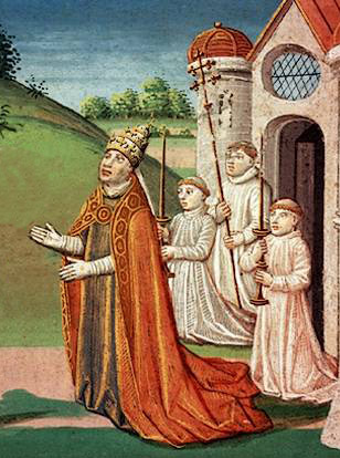 Pope Adrian I